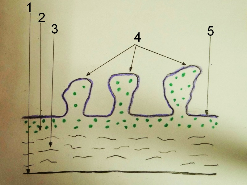 Isidium on lichens